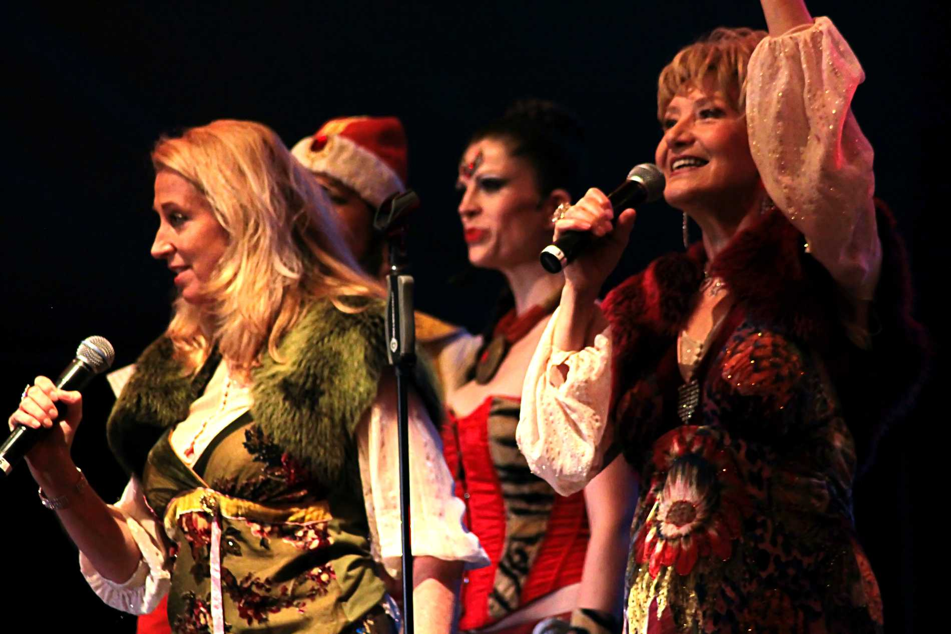 Dschinghis Khan - Ihre größten Hits Tour 2009